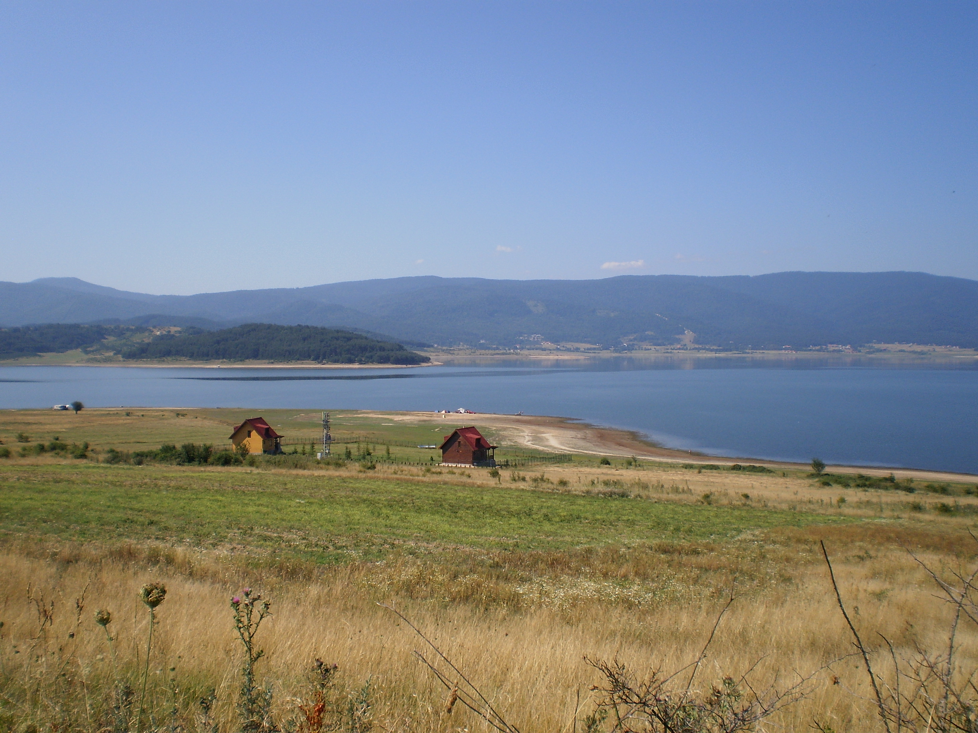 Изглед към язовир Батак от манастир Свети Георги